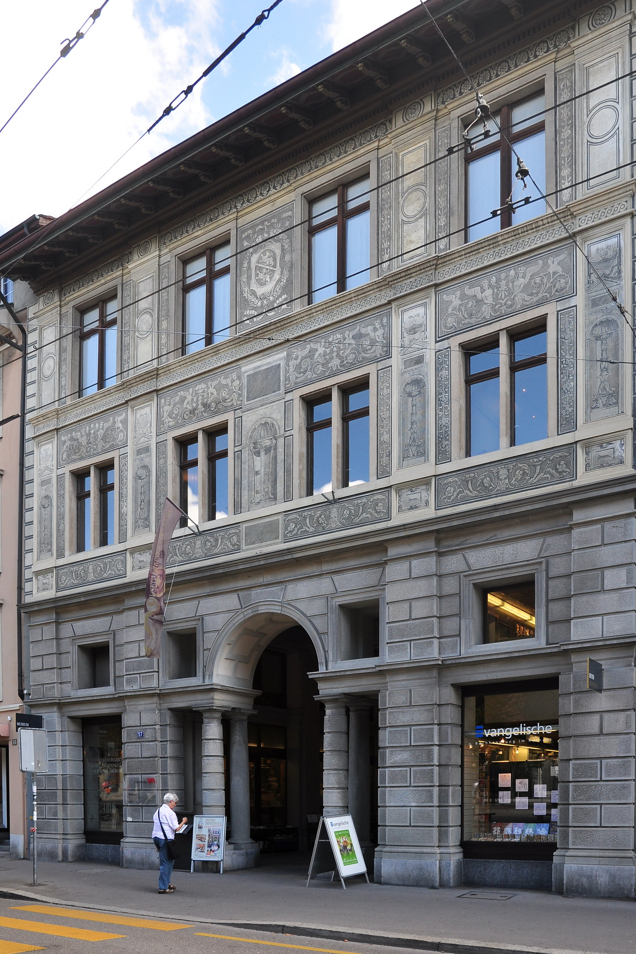 Rathaus, Marktgasse 20 in Winterthur (Switzerland)